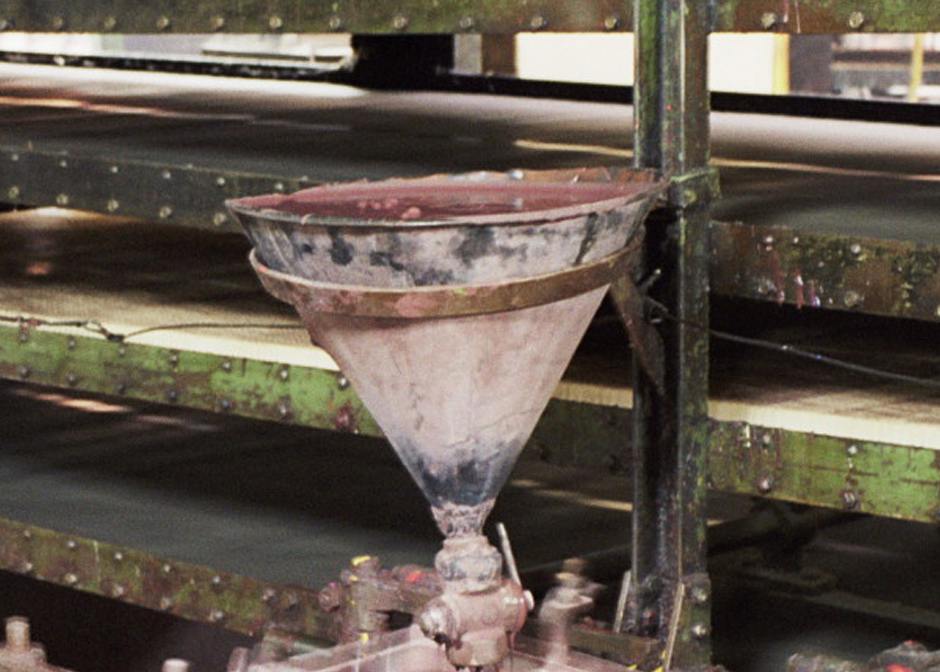 Muzeum produkcji zapałek w Częstochowie - masa zapałczana Author: Przykuta Date: december 2005